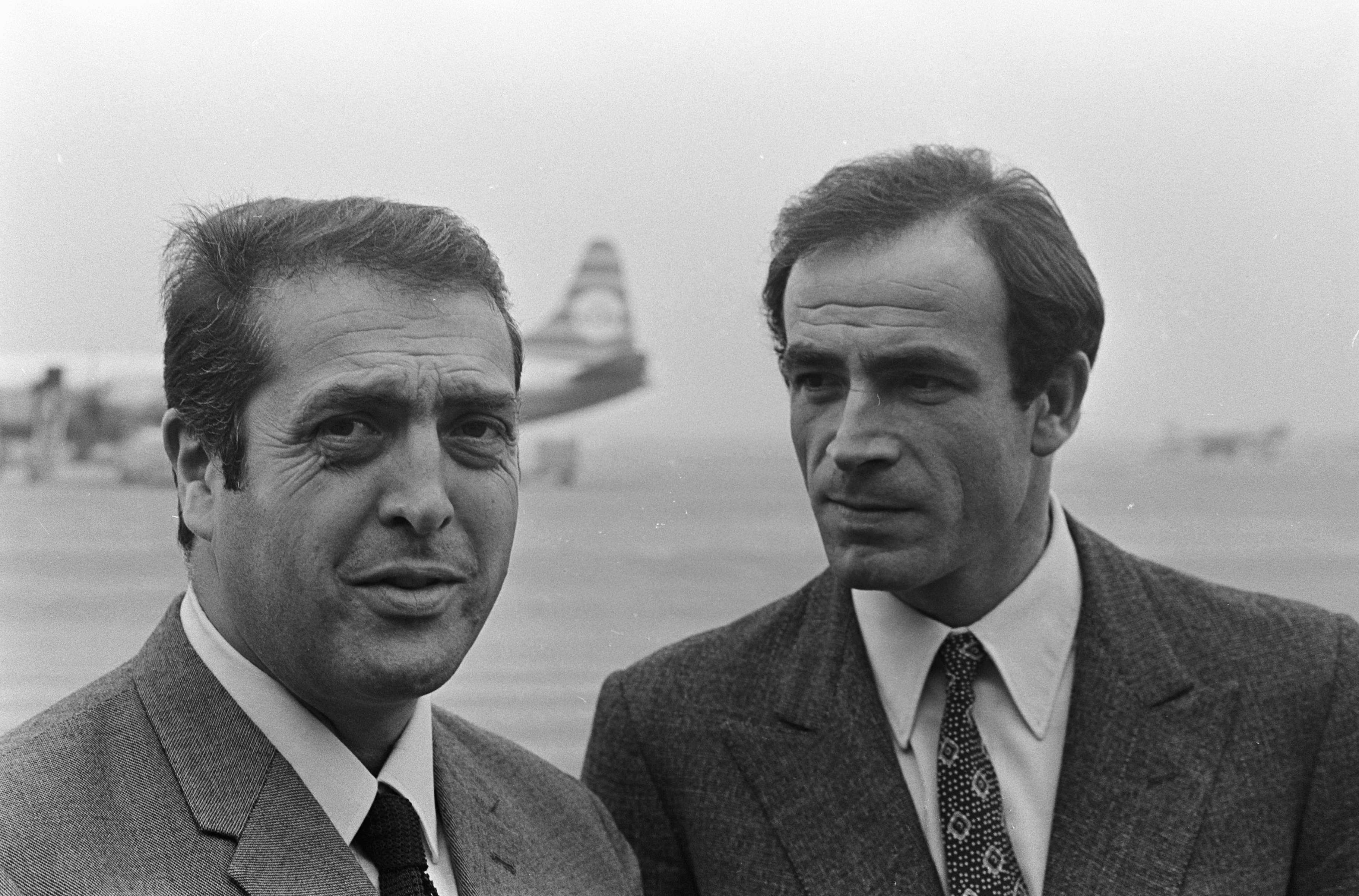 Collectie / Archief : Fotocollectie Anefo Reportage / Serie : [ onbekend ] Beschrijving : Aankomst regisseur George Lautner (links) en Venantino Venantini (filmster) op Schiphol Datum : 2 februari 1966 Locatie : Noord-Holland, Schiphol Trefwoorden : FILMSTERREN, Regisseurs, aankomsten Fotograaf : Kroon, Ron / Anefo Auteursrechthebbende : Nationaal Archief Materiaalsoort : Negatief (zwart/wit) Nummer archiefinventaris : bekijk toegang 2.24.01.05 Bestanddeelnummer : 918-7388